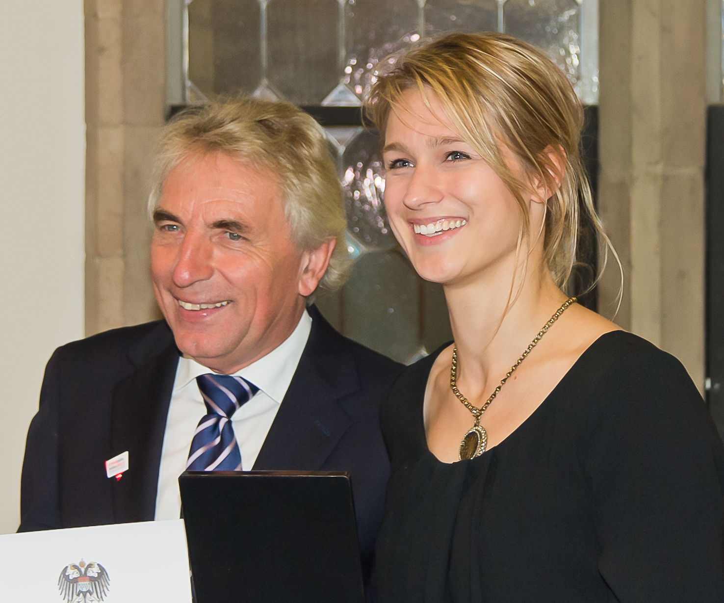 Empfang und Ehrung durch den Kölner Oberbürgermeisten Jürgen Roters für Kölner Olympioniken und Paralympics-Athleten im Hansasaal des Historischen Rathauses von KölnFoto: Kölns Oberbürgermeister Jürgen Roters und Britta Heidemann, Gewinnerin der Silbermedaille im Degenfechten bei den Olympischen Sommerspielen 2012 in London